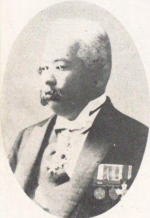 有賀長雄（1860-1921）